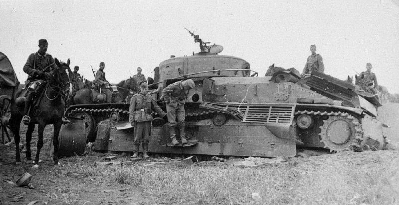 Zerstörter russischer Panzer T 28 nach den Kämpfen bei Kowno